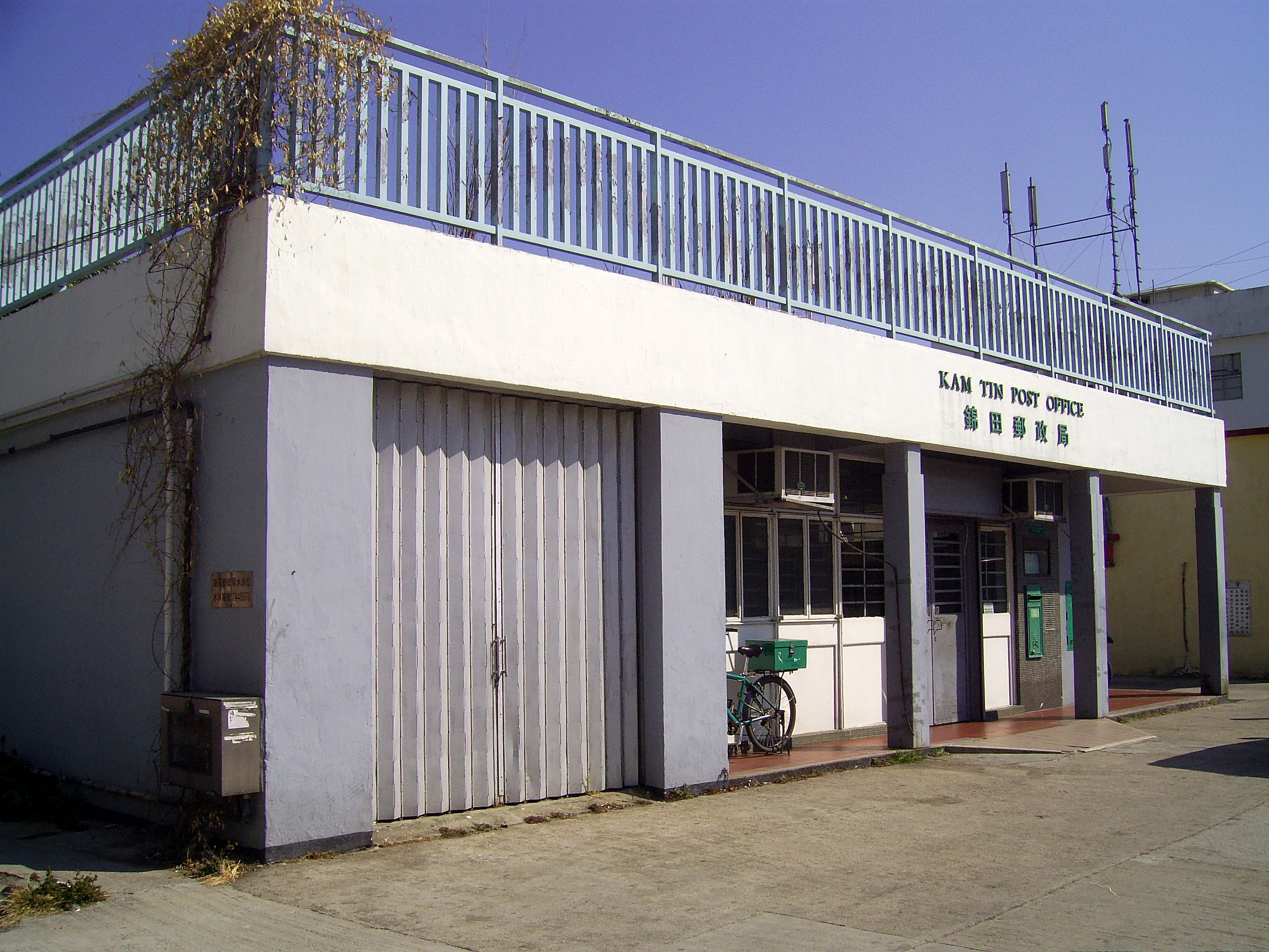 中文（香港）: 錦田郵政局